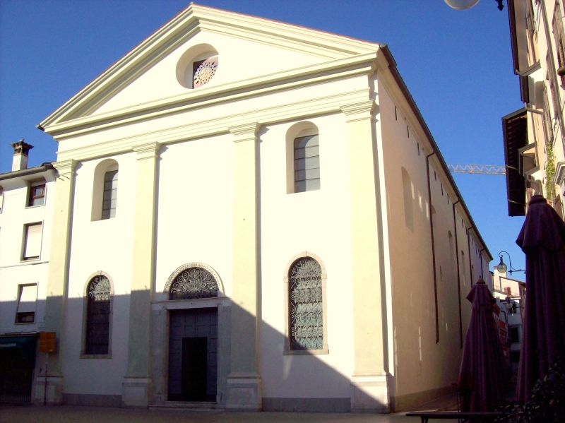 Udine: Chiesa di San Pietro Martire